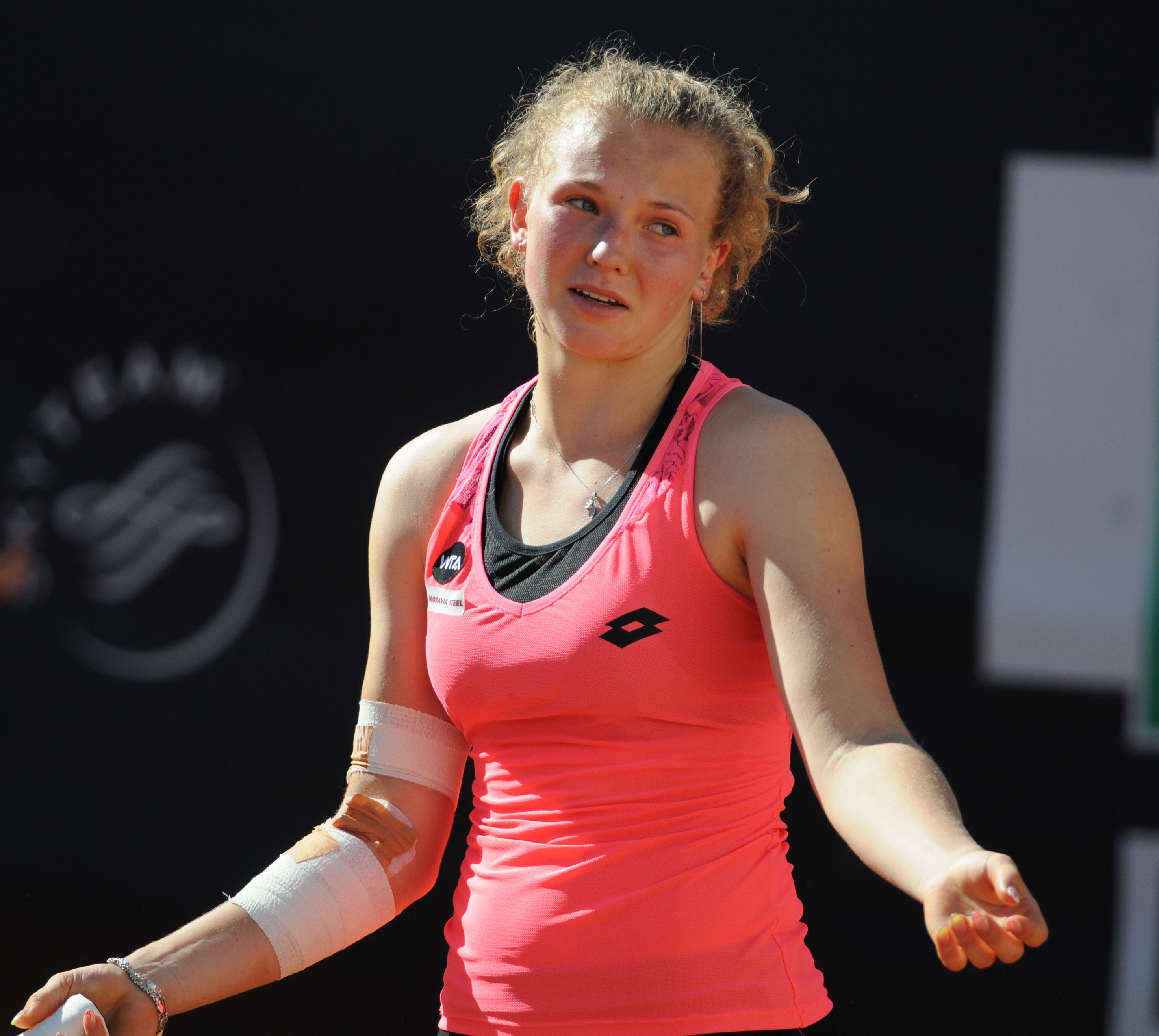 Kateřina Siniaková